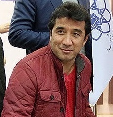 نشست شهردار مشهد با دو تیم سیاه جامگان و پدیده